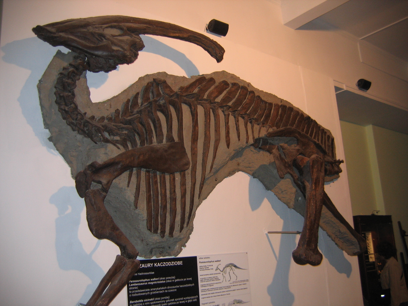 Dinozaur (Parasaurolophus walkeri) kaczodzioby z Muzeum Ewolucji w Warszawie